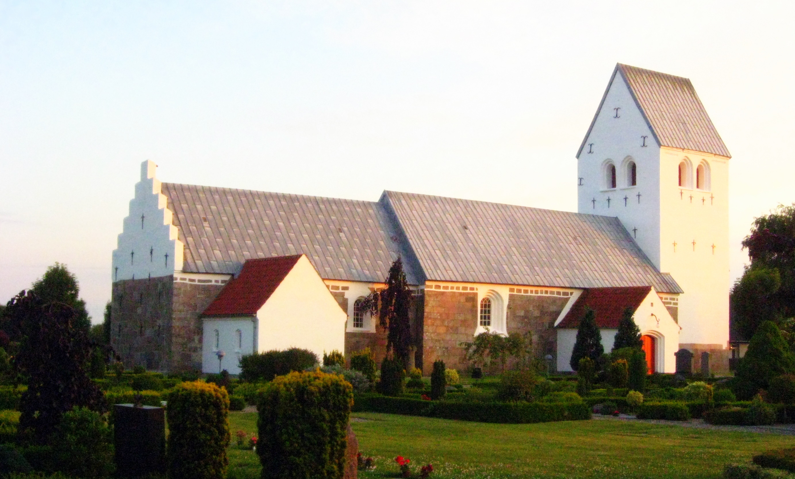 Vadum Kirke, Aalborg Kommune